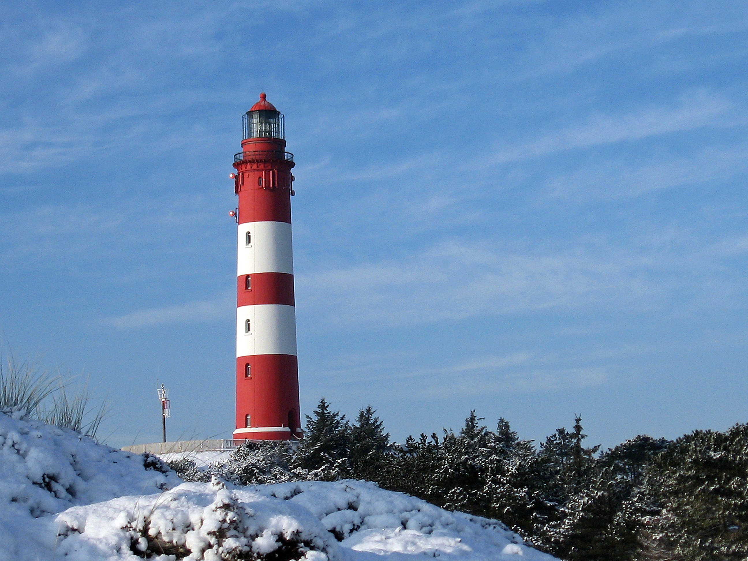 Leuchtturm in Nebel auf Amrum, in Betrieb seit 1875